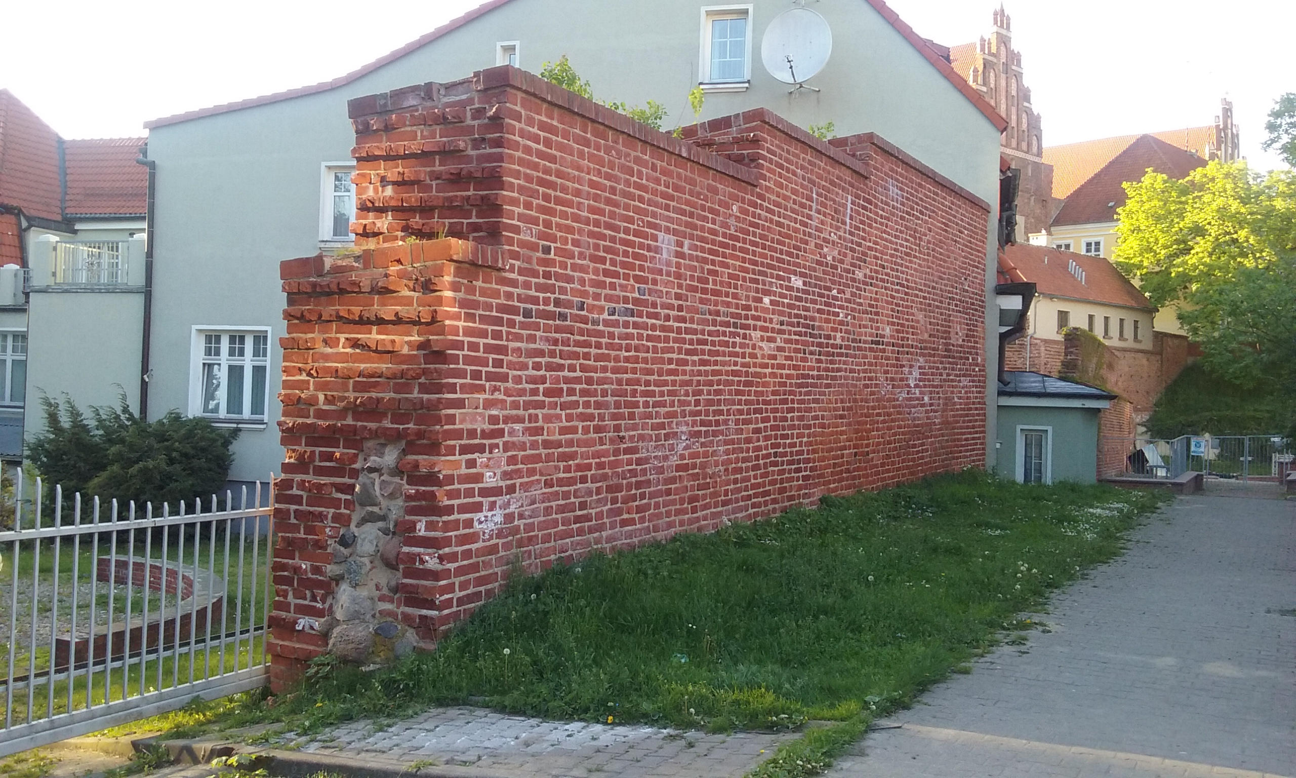 Fragment muru obronnego Olsztyna przy ul. Okopowej